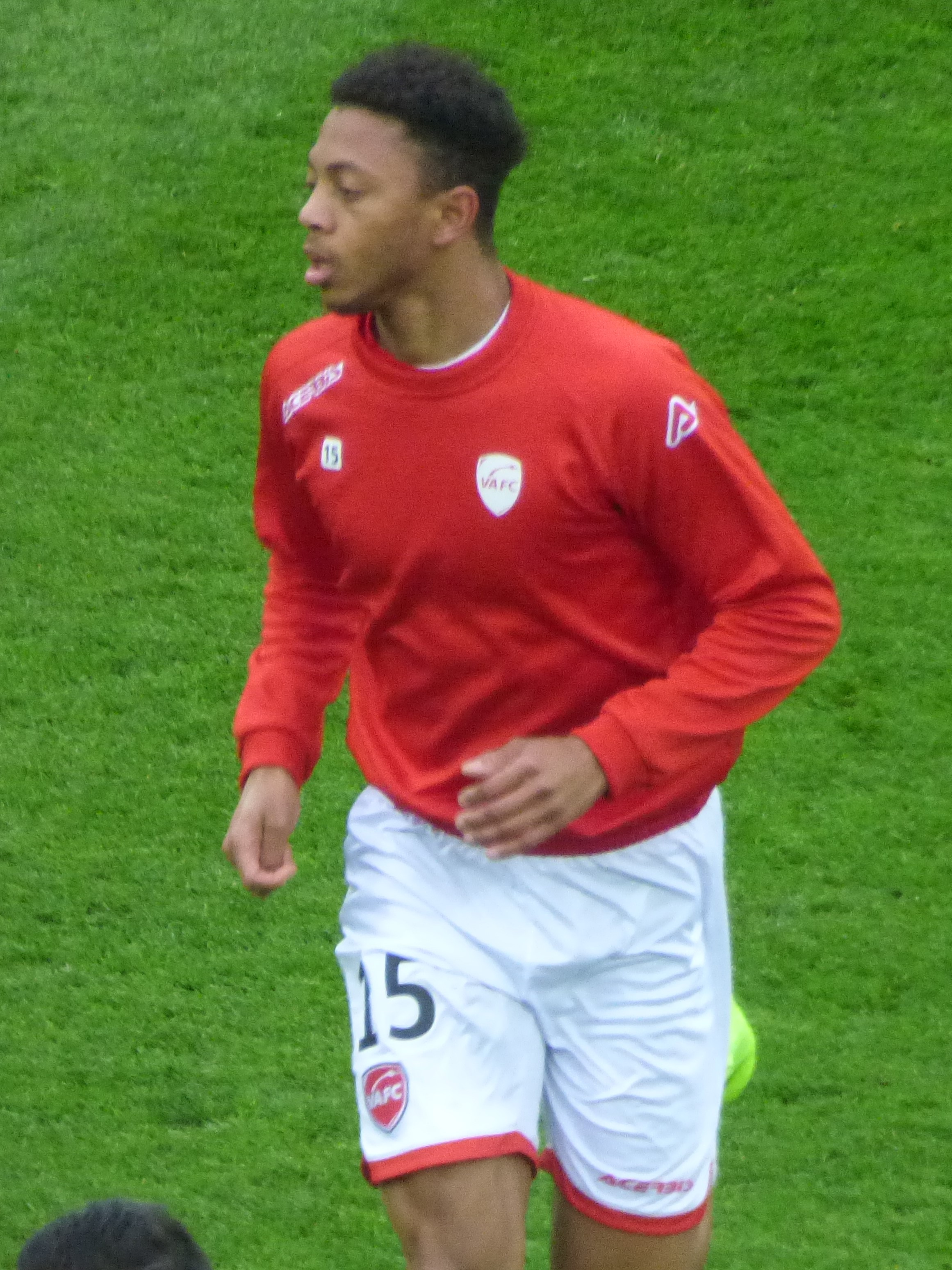 Nathaël Julan avant le match Lens-Valenciennes, comptant pour la 32ème journée du championnat de France de football de Ligue 2 2018-2019, le 12 avril 2019, au Stade Bollaert-Delelis.